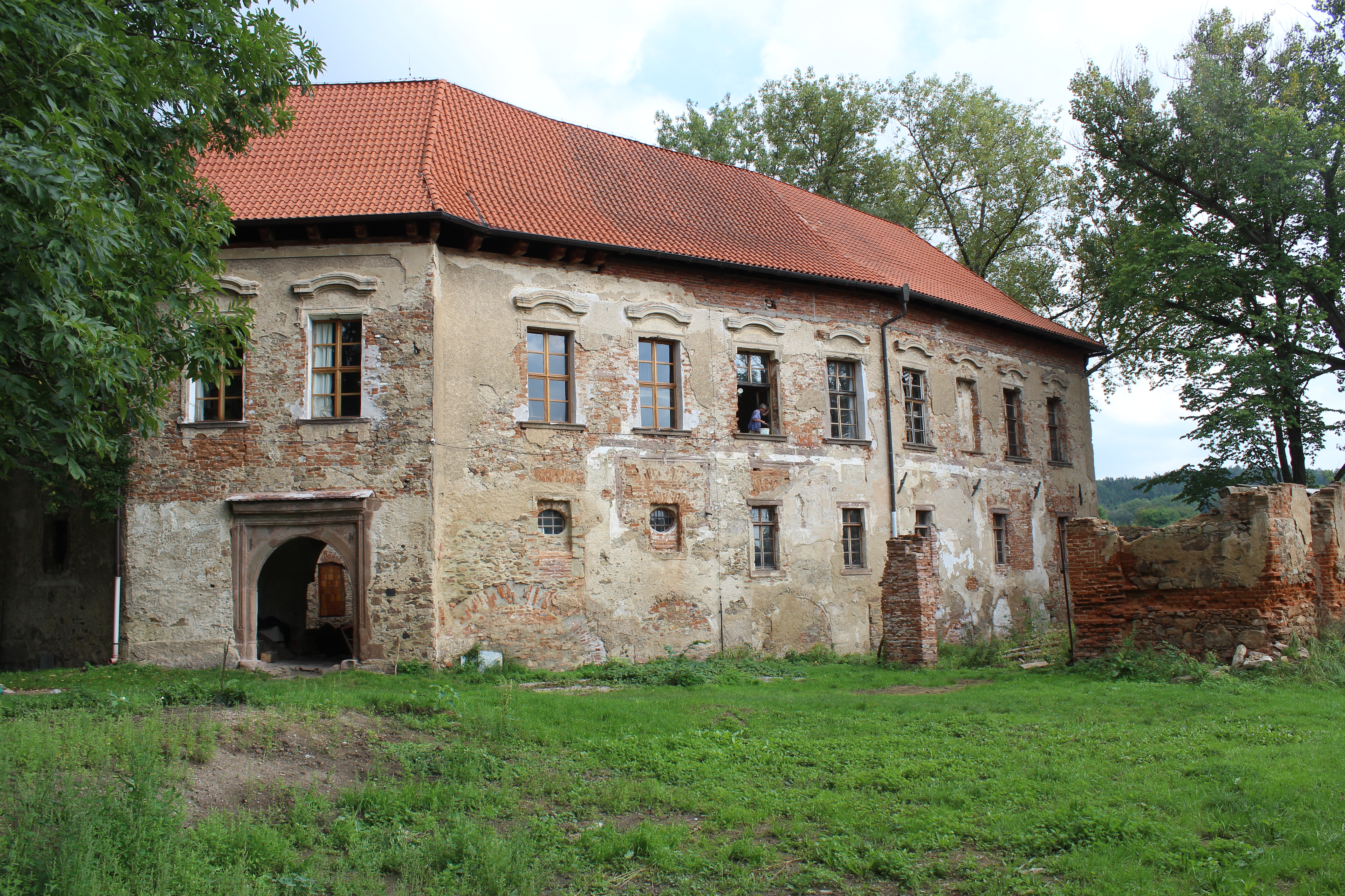 Vodní tvrz Popovice (okres Benešov).Pohled na západní křídlo a severozápadně natočený vstupní rizalit s portálem. Tvrz Popovice (Benešov) je vynikající ukázkou vývoje panského sídla od tvrze k renesančnímu a baroknímu zámečku. Vývojové fáze tvrze dokumentuje obnažené cihlové zdivo západního křídla. V pohledu z prostoru před tvrzí směrem na východ je zřetelně vidět nová střecha nad západním křídlem, obnovený pozdně gotický portál brány. Zcela vlevo vystupuje severozápadně natočený vstupní rizalit s portálem brány. Patro západního křídla a vstupního rizalitu má vysoká okna se šambránami s volutovýma ušima a s výraznými suprafenestrami se stlačeně vzepjatými římsami.Vpravo před západním křídlem jsou viditelné zbytky cihelného zdiva odstraňované novodobé přístavby lihovaru.